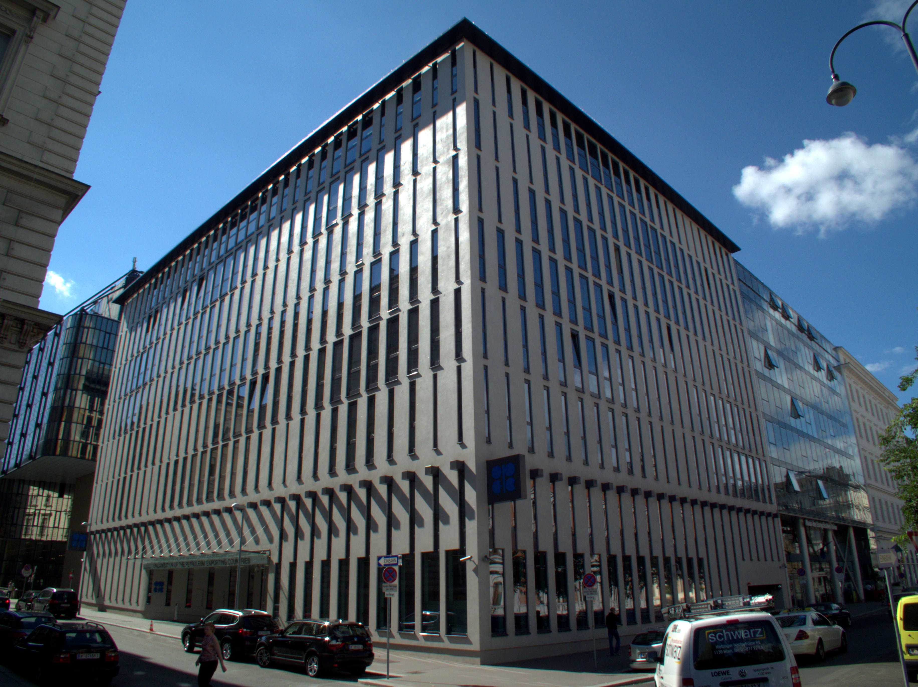 Das Opec Gebäude in Wien Helferstorferstraße 17 bei der Börse